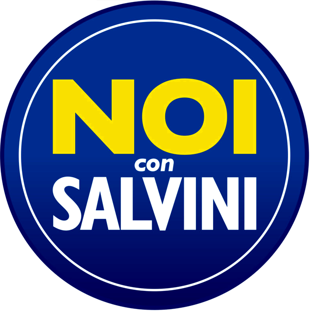 Simbolo elettorale di Noi con Salvini. File creato su Microsoft Timeline e caricato su Paint